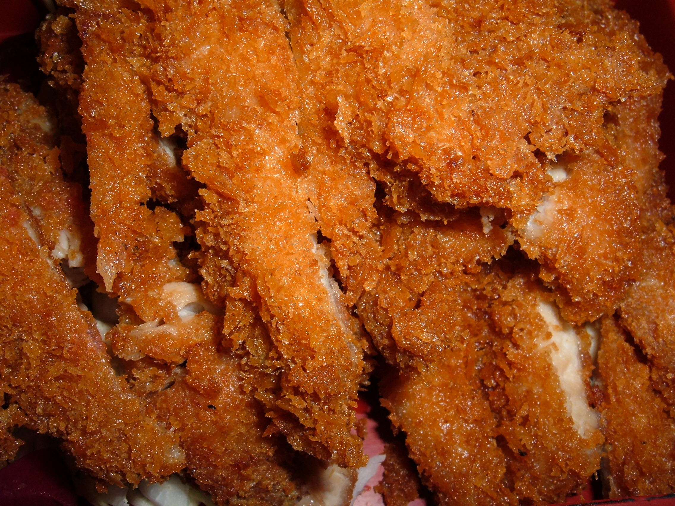 Chicken katsu